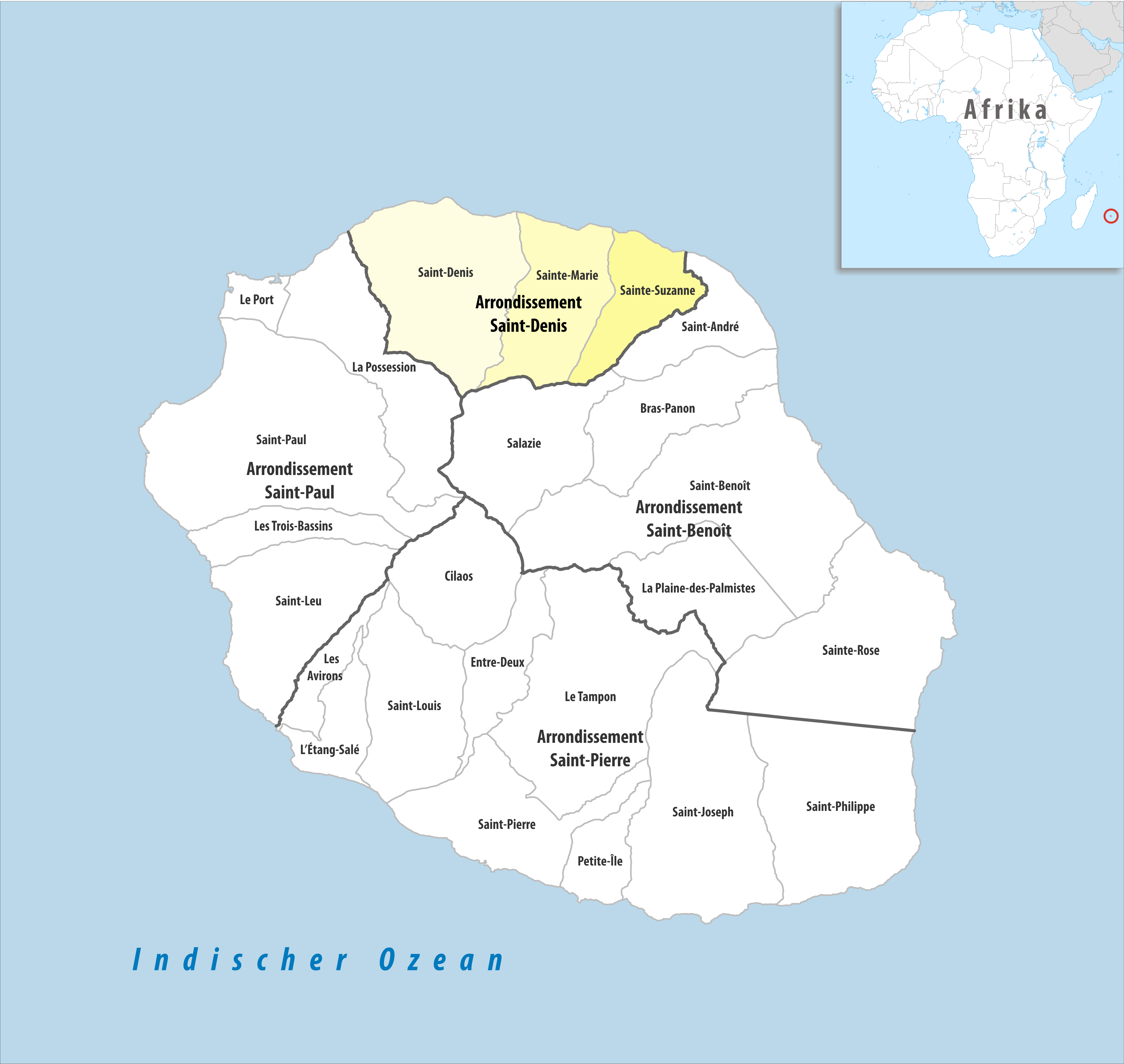 Lage des Arrondissements Saint-Denis